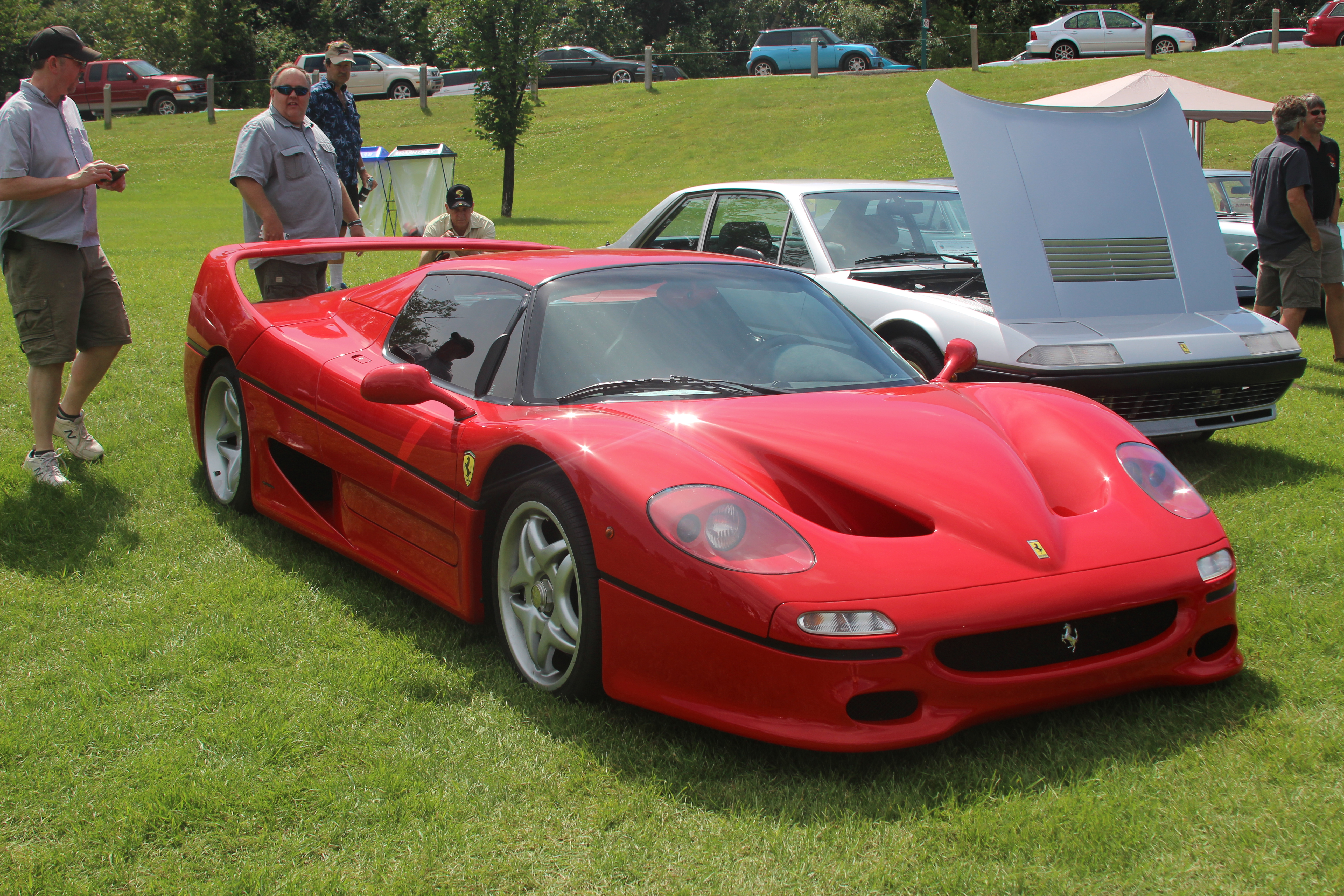 Ferrari F50